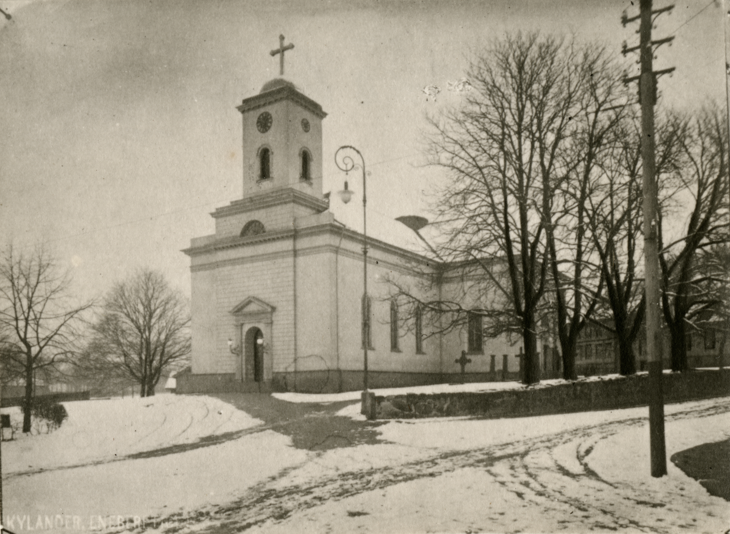 Immanuelskirken i Halden, Østfold